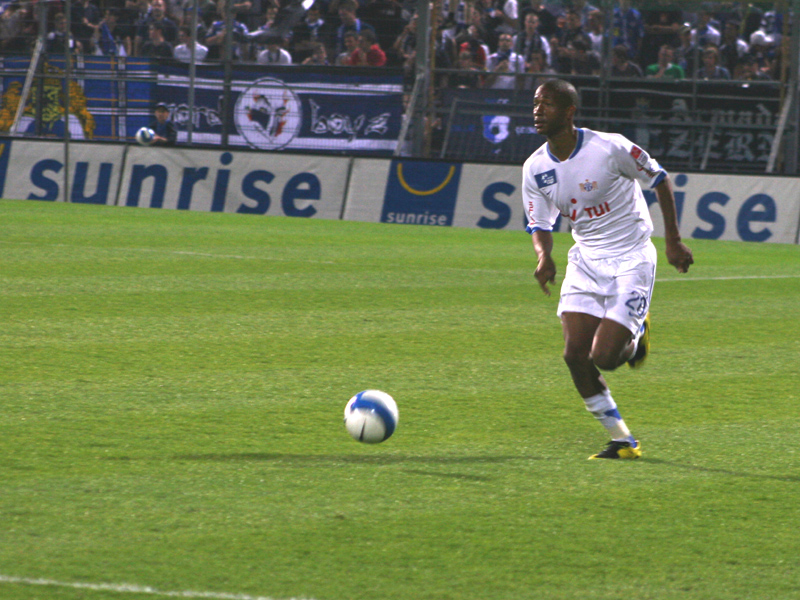 César, FCZ, Hardturm Stadion (Schweiz), Pokal Halbfinale, FC Zürich - FC Luzern 2:3